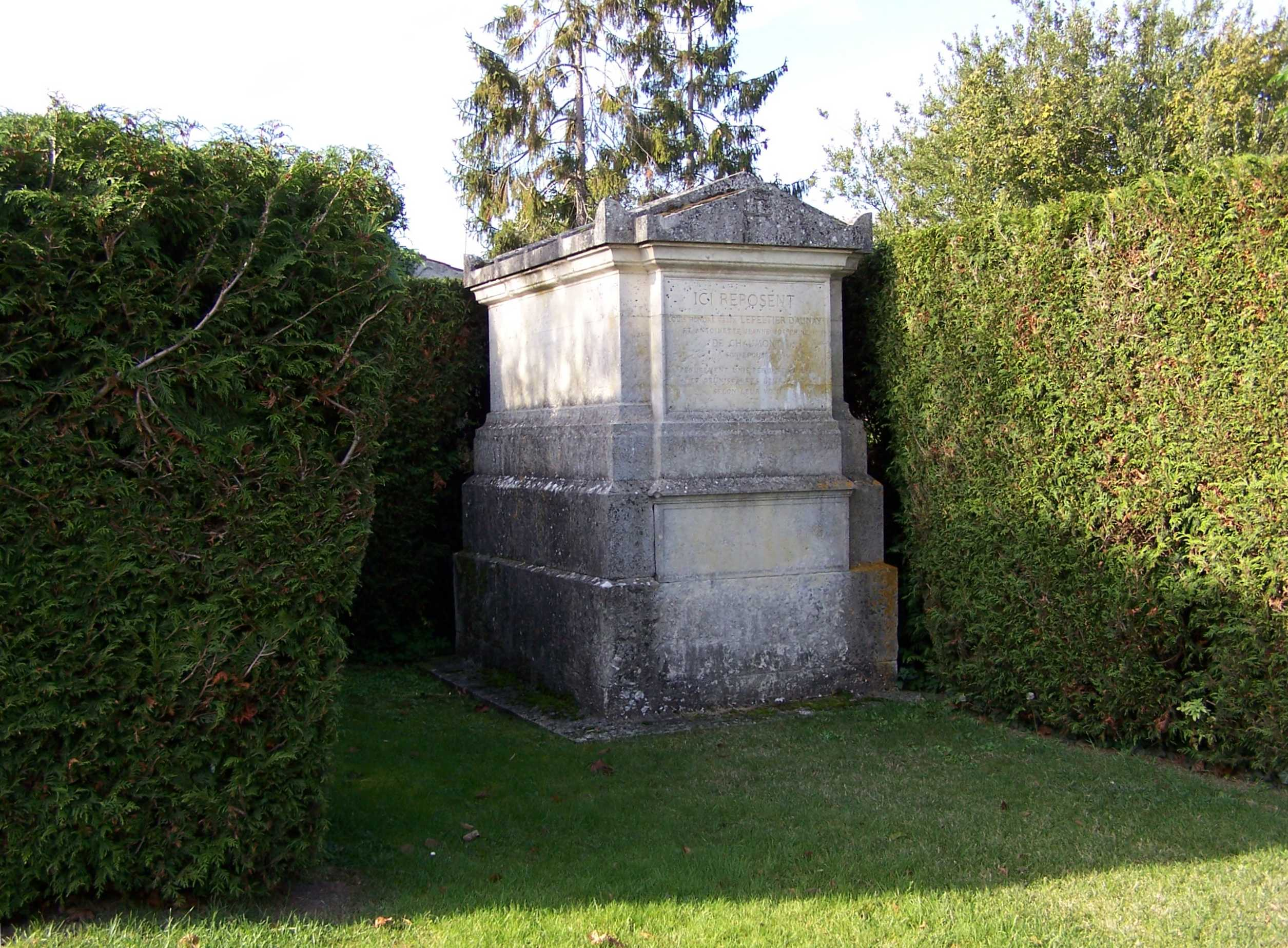 Tombeau en bord de route à Mareil-le-Guyon (Yvelines, France)